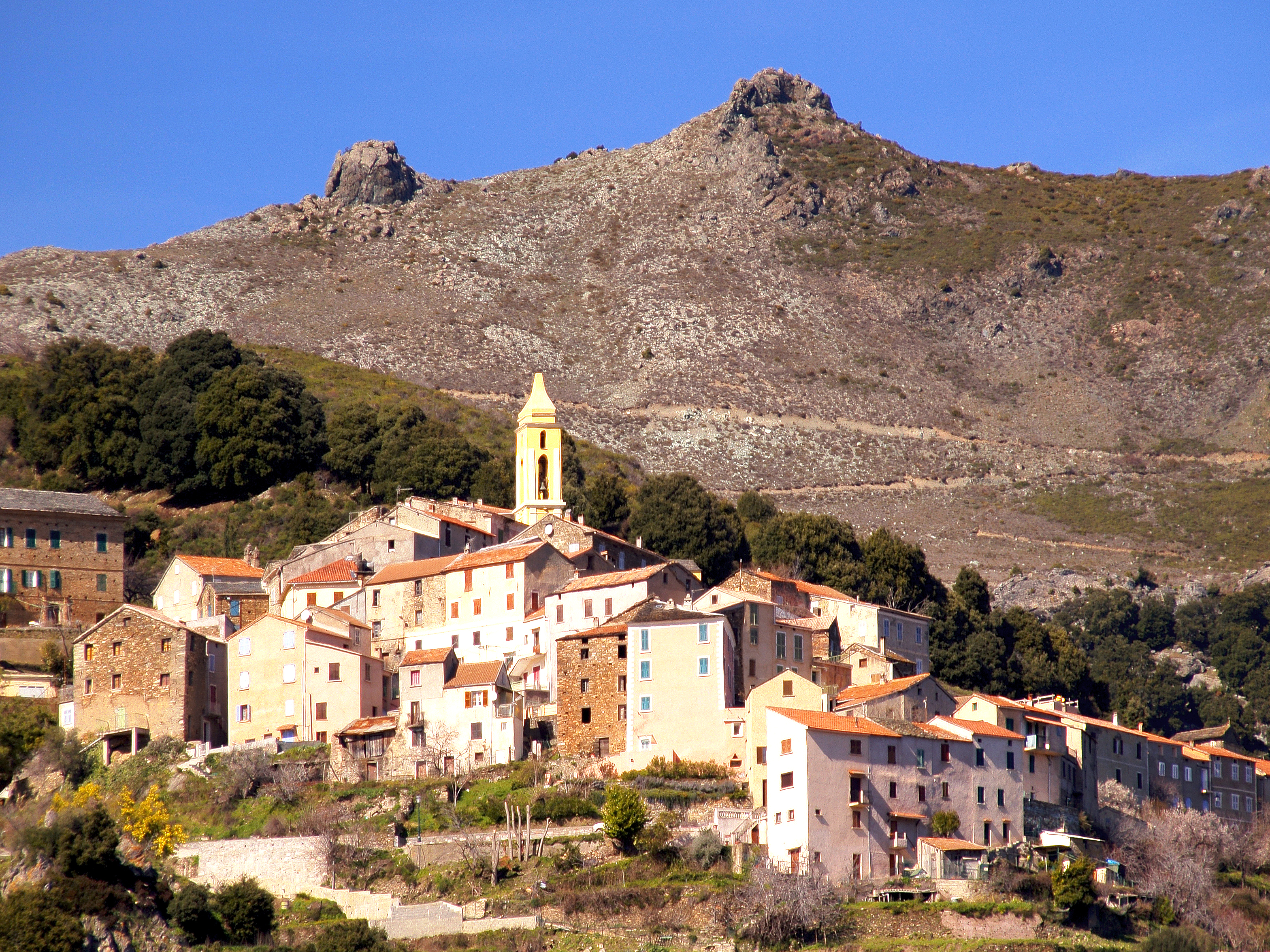 Lento - Le village